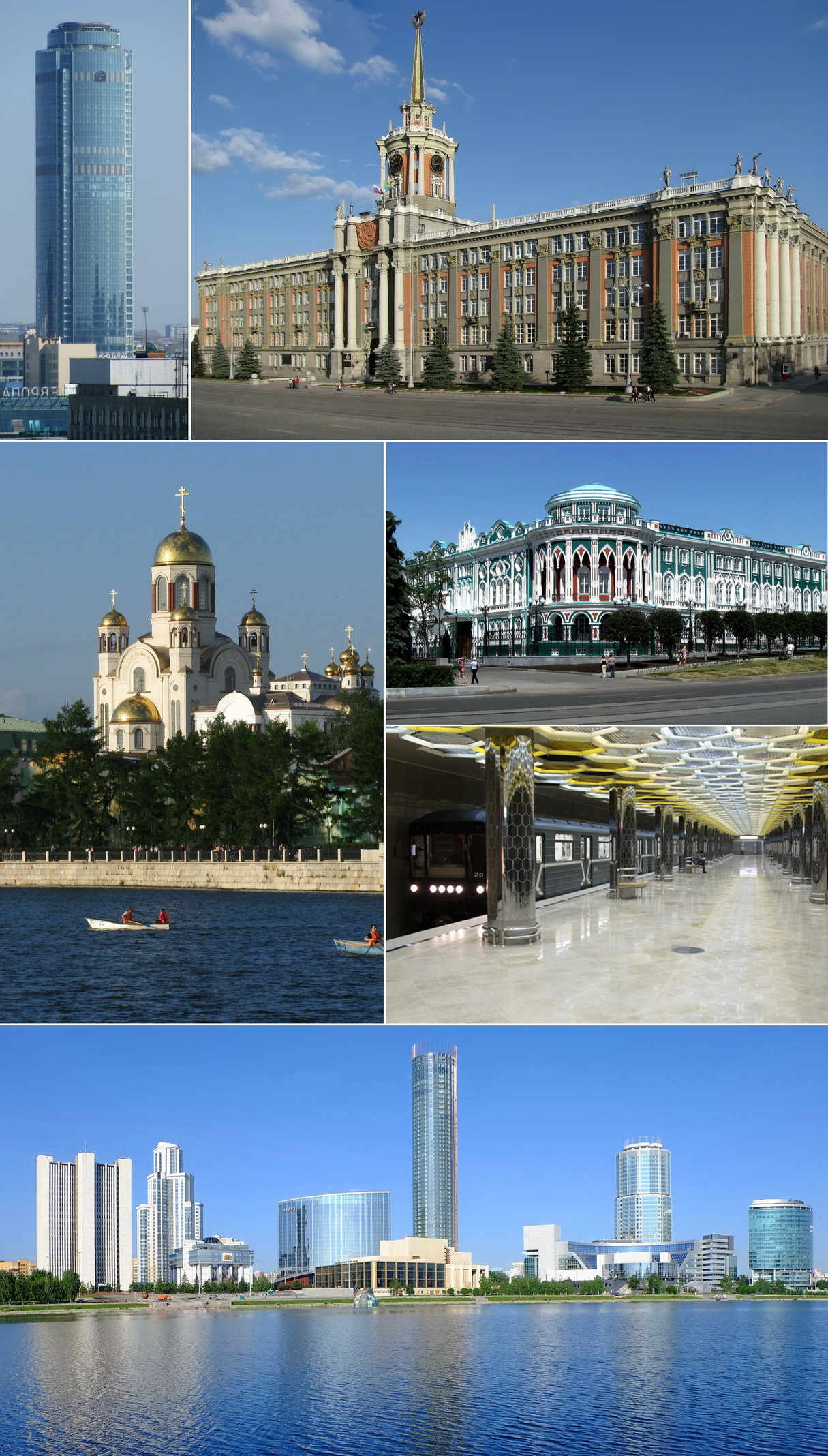 Коллаж Екатеринбурга. По часовой стрелке начиная с левого верхнего угла: небоскрёб "Высоцкий", здание городской администрации, Здание бывшего окружного суда ("Дом Севастьянова"), Станция Екатеринбургского метрополитена "Ботаническая", Правый берег Городского пруда ("Екатеринбург-сити"), Храм-на-крови.